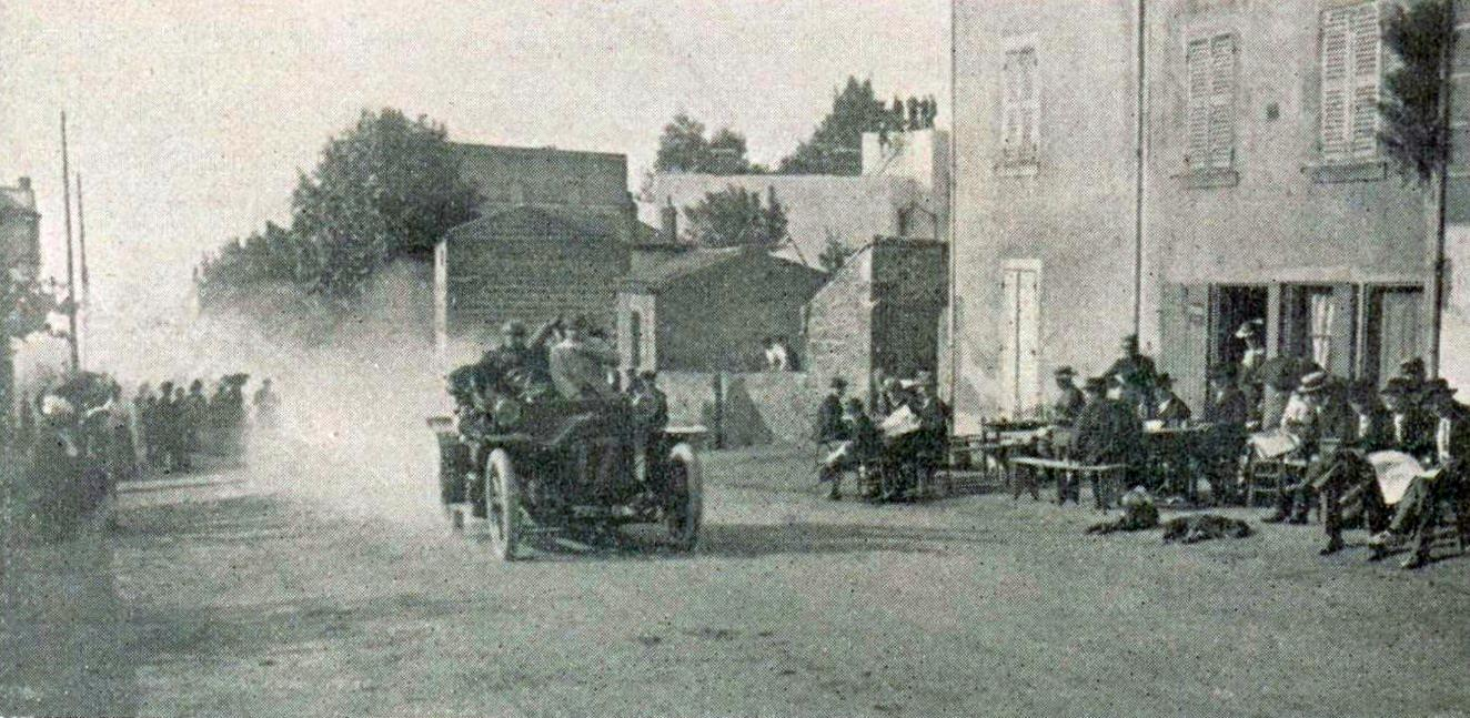 Coupe Rochet-Schneider 1906, dans la côte de la Baraque (au volant Cristy).